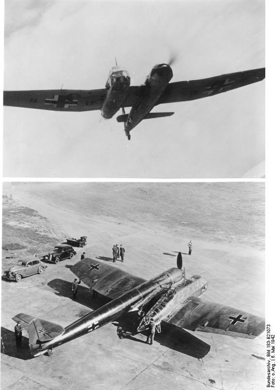 BV 141 - das erste unsymmetrische Flugzeug der Welt! Die Flugzeugwerke der weltbekannten Schiffswerft Blohm & Voss haben für die deutsche Luftwaffe mit der BV 141 ein in Aufbau und Formgebung vollkommen neuartiges Flugzeugmuster entwickelt, das bei seinen ersten Einsätzen im Ostfeldzug überragende Erfolge verbuchen konnte. Dieses erste "unsymmetrische" Flugzeug der Welt ist eine Schöpfung des Chefkonstrukteurs der Flugzeugwerke Blohm & Voss, Wehrwirtschaftführer Dr. Ing. Vogt. Der Sondereinsatz, für den dieses Flugzeug vorgesehen ist, bedingte eine von den bisher eingeschlagenen Wegen der Flugtechnik grundlegend abweichende Konstruktion. Diese kann in ihrer nach jahrelanger Forschungsarbeit nunmehr erreichten Lösung als epochemachend angesehen werden. Erstmalig findet sich hier die vollkommen unsymmetrische Bauart, die auf dem linken Flügel den Leitwerkträger mit Motor und auf dem rechten Flügel den getrennt hiervon als geschlossene Vollsichtkanzel ausgeführten Raum für die dreiköpfige Besatzung trägt. Die auf Grund der taktischen Forderungen notwendige Sonderheit der Konstruktion hat gleichzeitig einen überaus günstigen Einfluß auf die Flugeigenschaften und Leistungen des Flugzeuges ergeben: hohe Geschwindigkeit, besondere Wendigkeit und Steigleistung. Die Bewaffnung der BV 141 besteht aus Kanonen und Maschinengewehren modernster Konstruktion. Als Motor finde der neue BMW-Doppelsternmotor BMW 801 Verwendung. Bereits seit geraumer Zeit läuft die BV 141 im Grosserienbau in den in Ostdeutschland gelegenen Flugzeugwerken der Firma Blohm & Voss. Der damit garantierte, in immer gesteigerterem Umfang möglich werdende Einsatz dieses Flugzeuges bedeutet eine wesentliche Stärkung der Schlagkraft unserer Luftwaffen. PK-Aufnahme: Luftwaffe (Sch) 2722-42